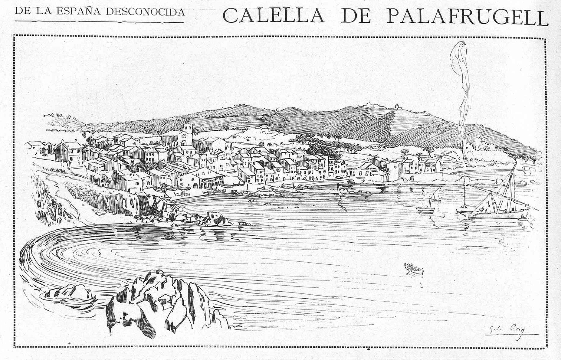 De la España desconocida. Calella de Palafrugell.